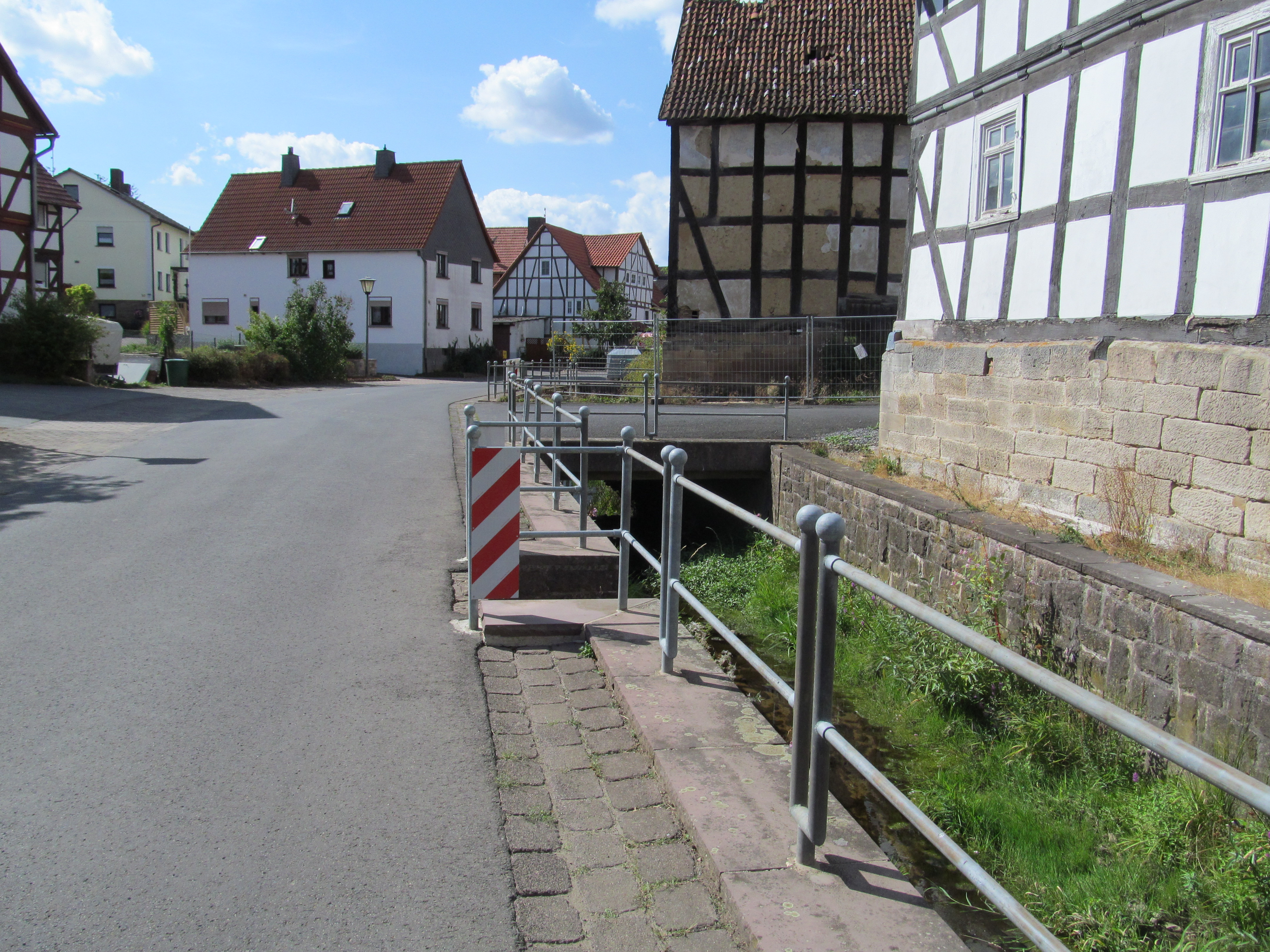 der Grenzebach neben der Straße Am Wasser in Obergrenzebach